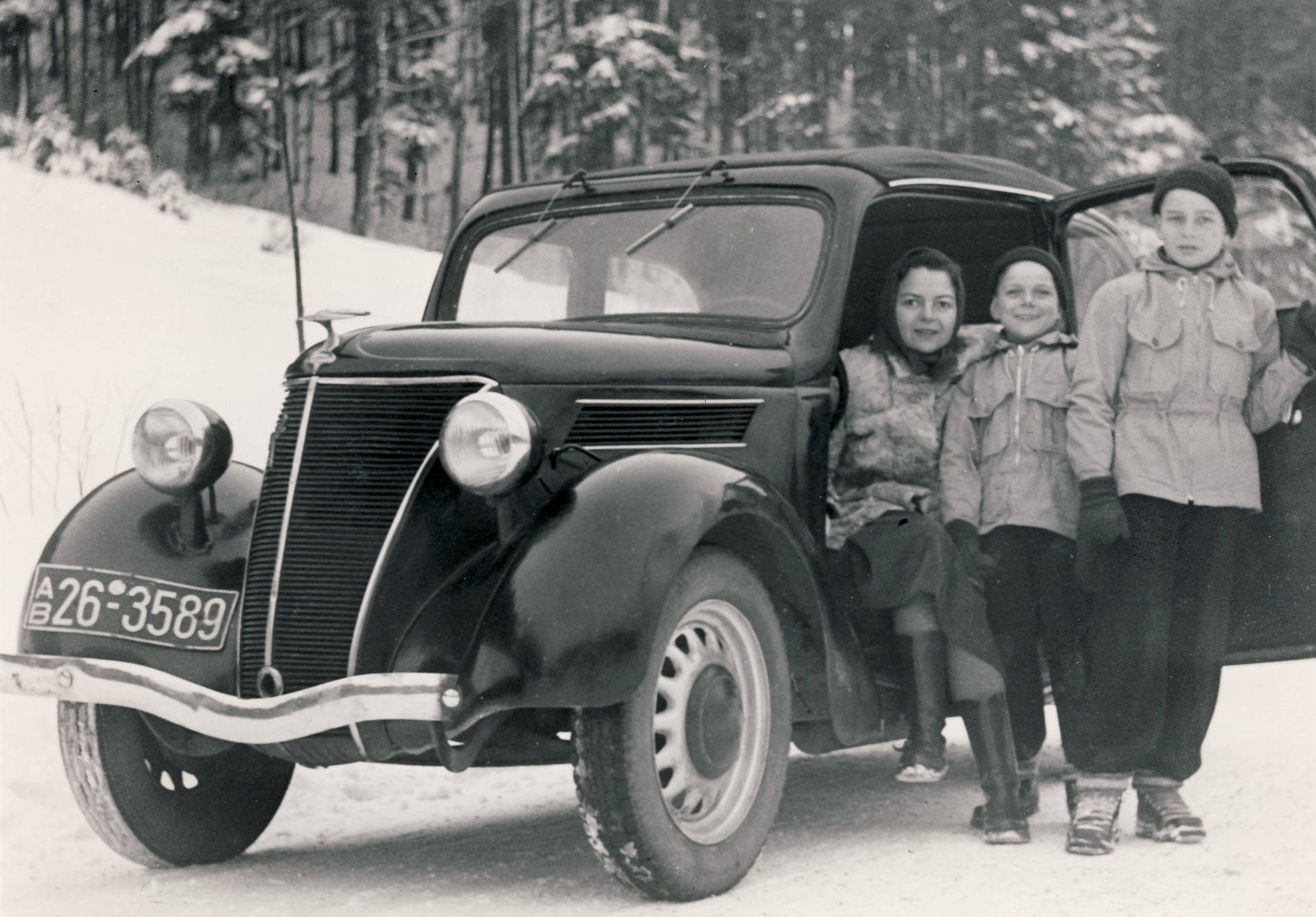 Ford Eifel mit Sonnendach, Baujahr 1936